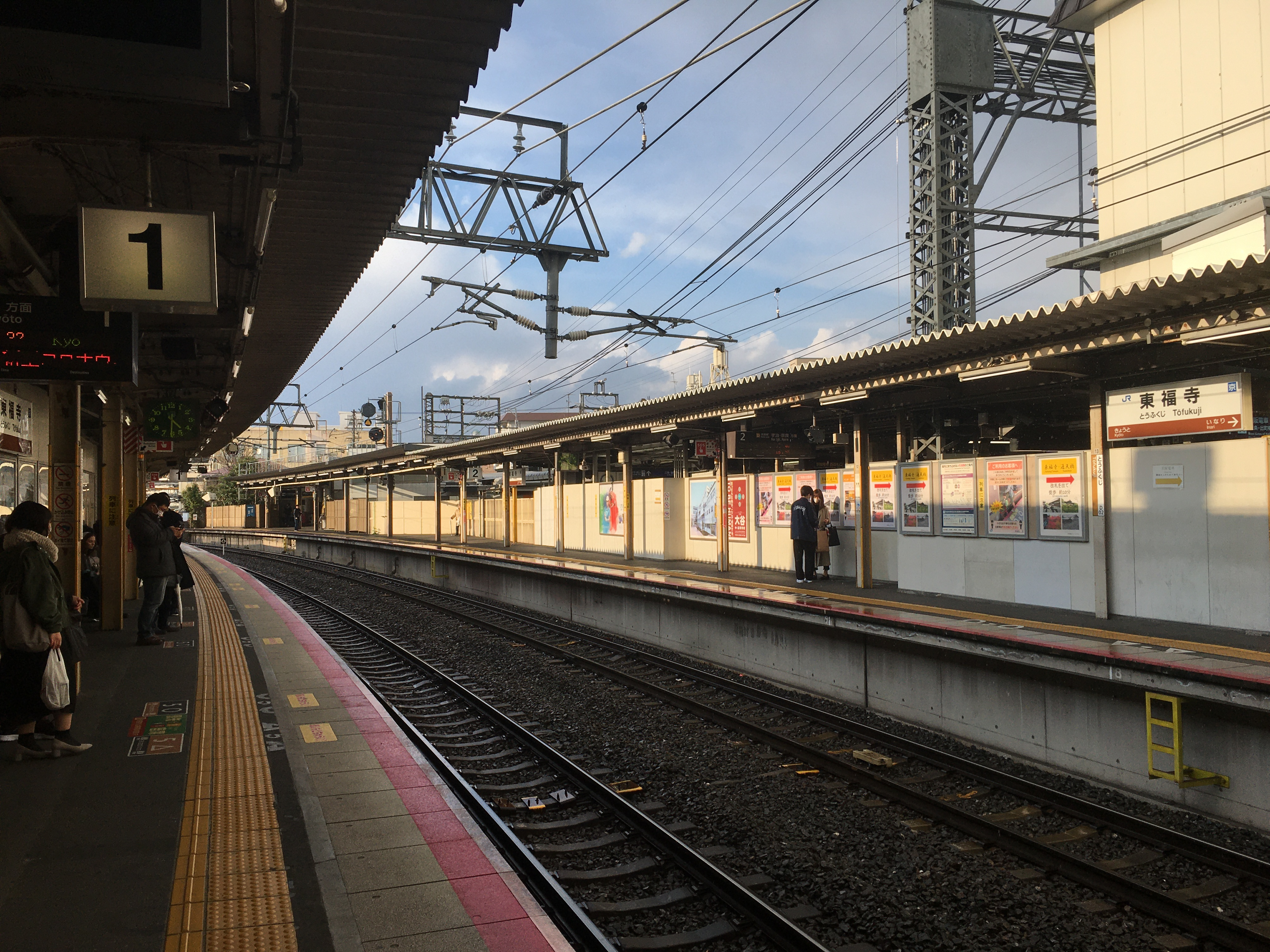 東福寺駅 (Tōfukuji Station)